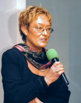 Barbara Maria Okulicz-Sługocka h. Oksza. Dziennikarka, współzałożycielka Wyższej Szkoły Komunikowania i Mediów Społecznych im. Jerzego Giedroycia.